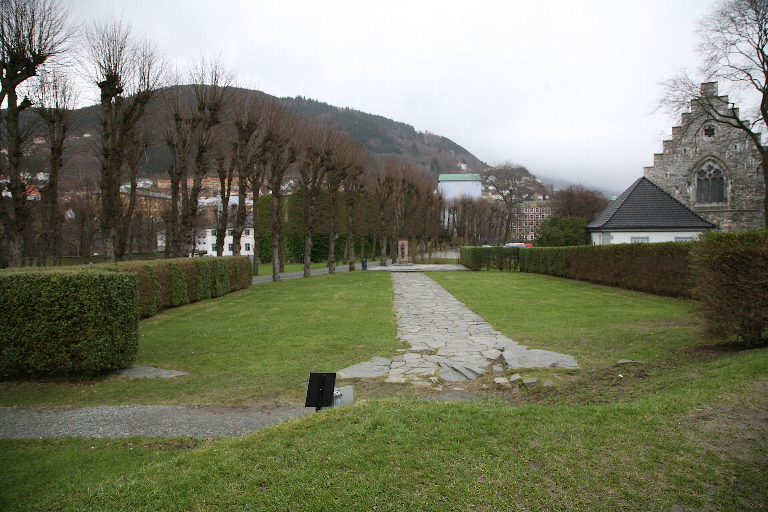 Bergenhus festning